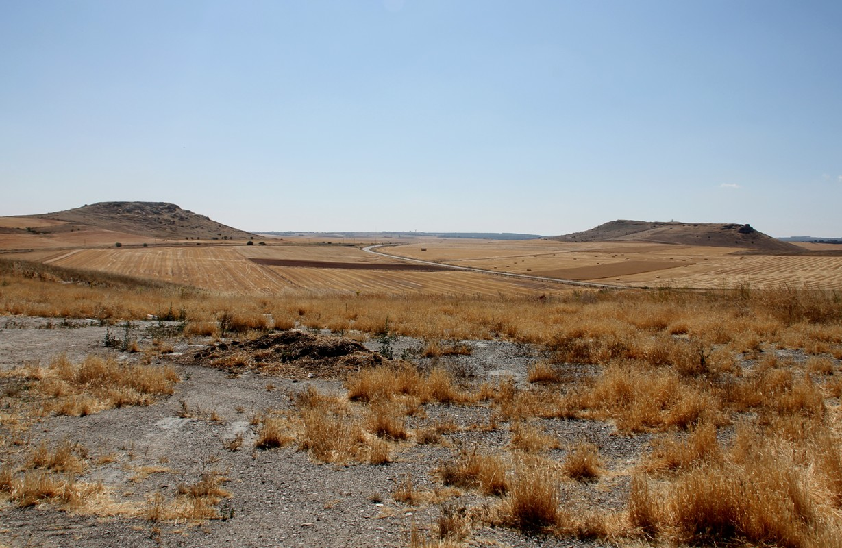 Arapil Grande y Arapil Chico desde la posición de Wellington durante varias fases de la Batalla de los Arapiles